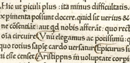 Detail von "De divinis institutionibus" von Lactantius, gedruckt von Pannartz und Sweynheim 1465.